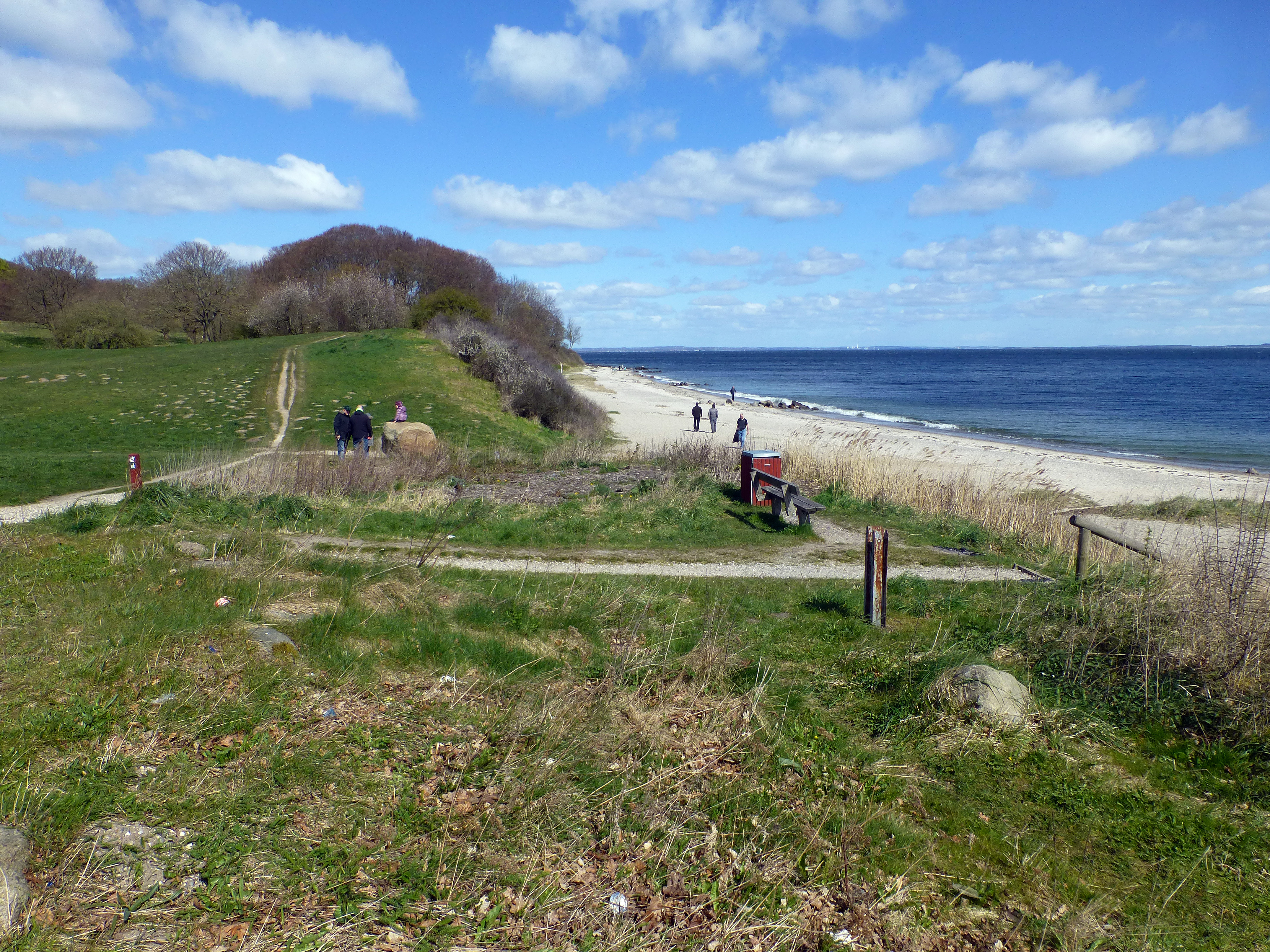 Moesgaard Strand set mod nord